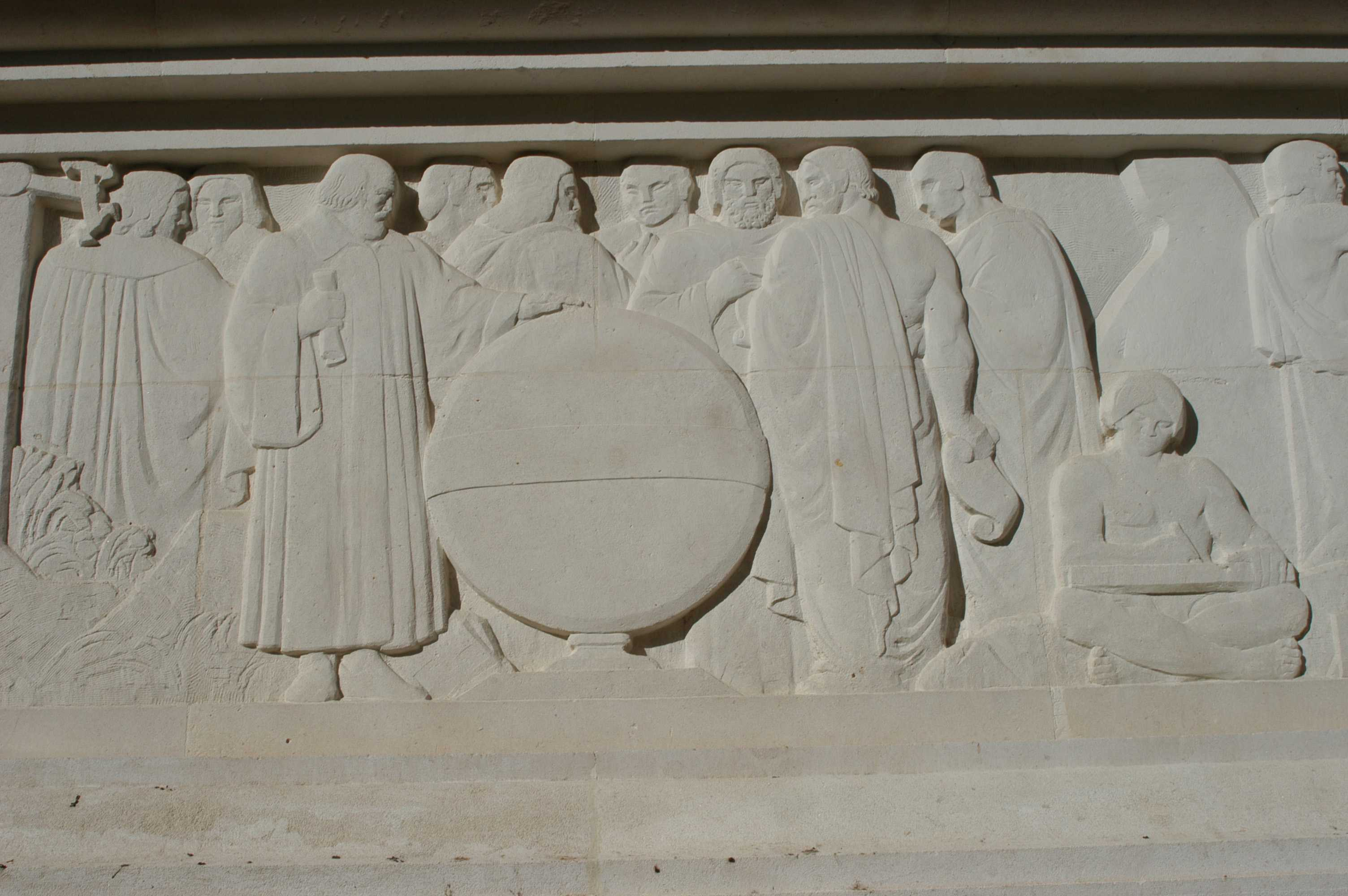 Bibliothèque d'Etude et du Patrimoine, Toulouse.